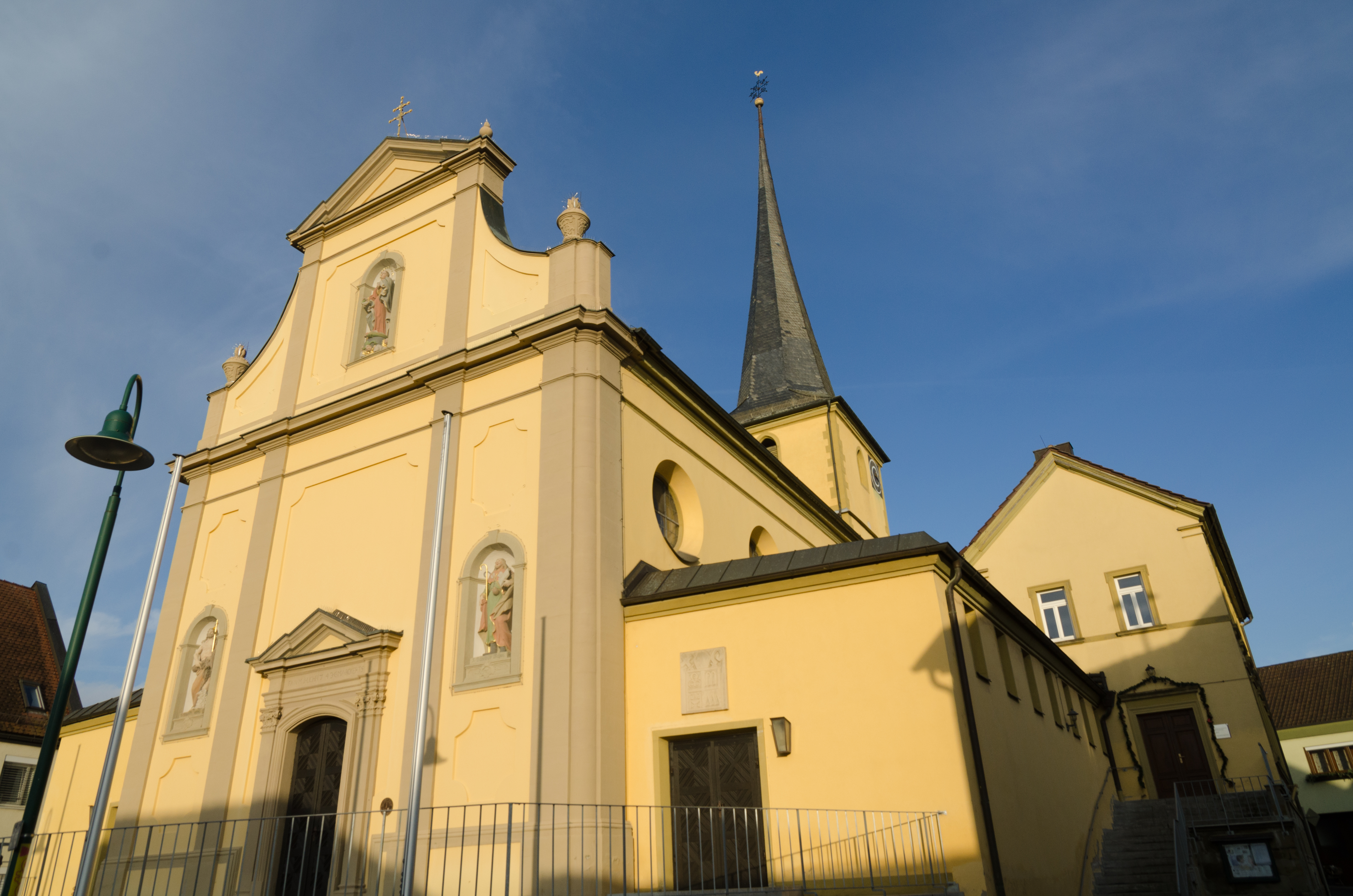 Poppenhausen, Kath. Pfarrkirche St. Jakob